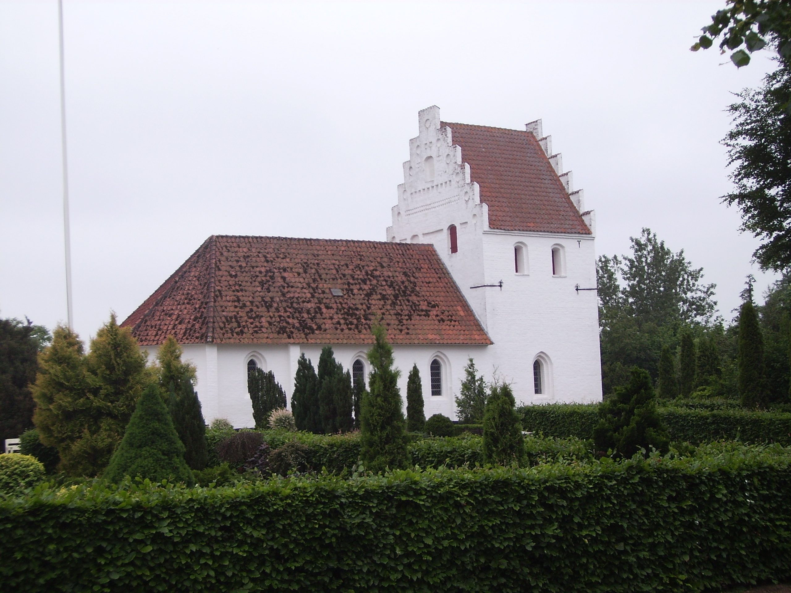 Allested Kike, Allested Sogn, Sallinge Herred, Svendborg Amt, Denmark (Danish Church)